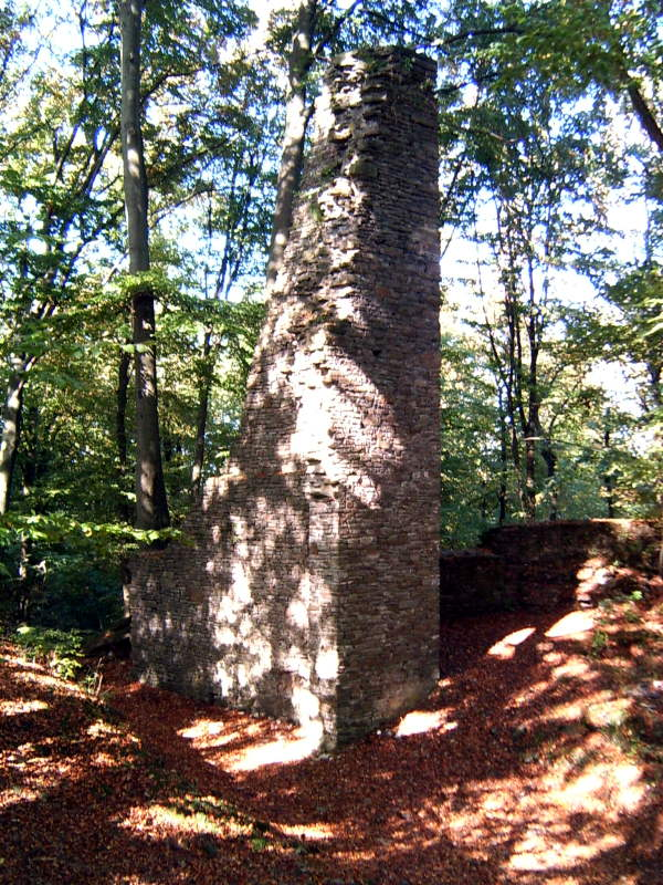 Burgruine Neuenberg im Oberbergischen Land